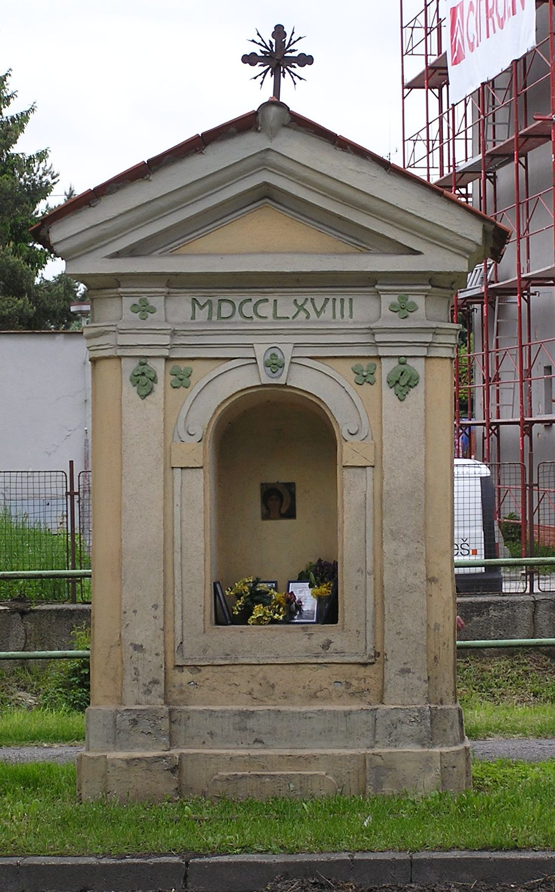 Výklenková kaplička, Dobrovodská, České Budějovice